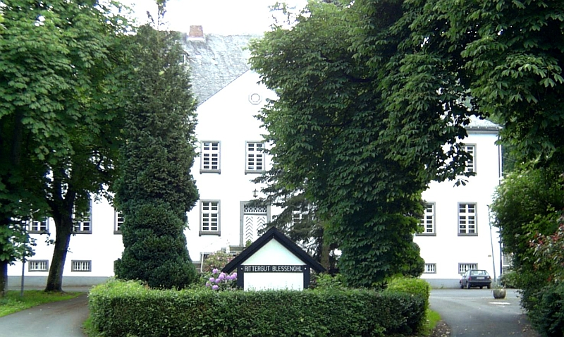 Rittergut Blessenohl, Eslohe (Germany)